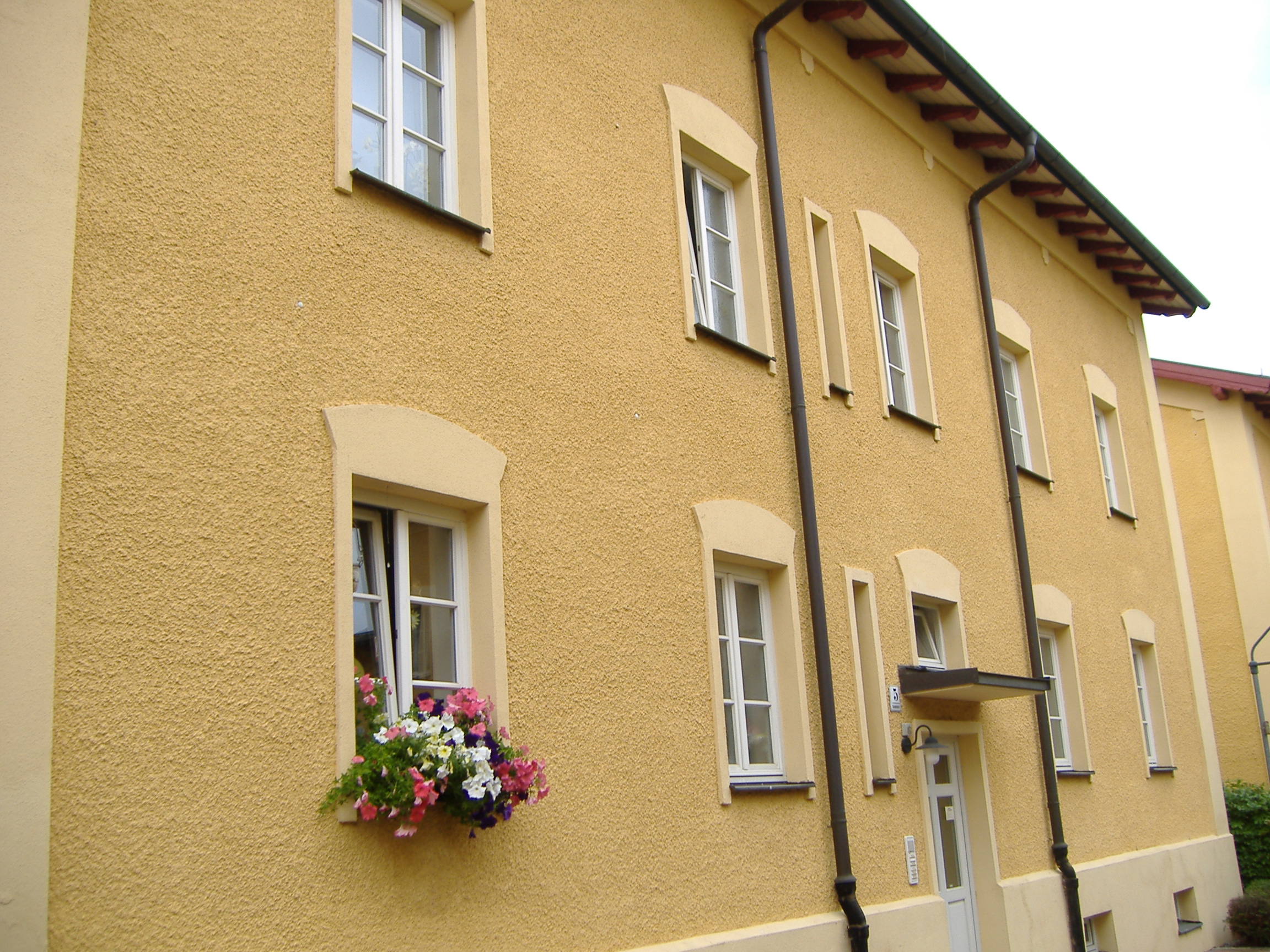 Kolonie Augsburg-Göggingen